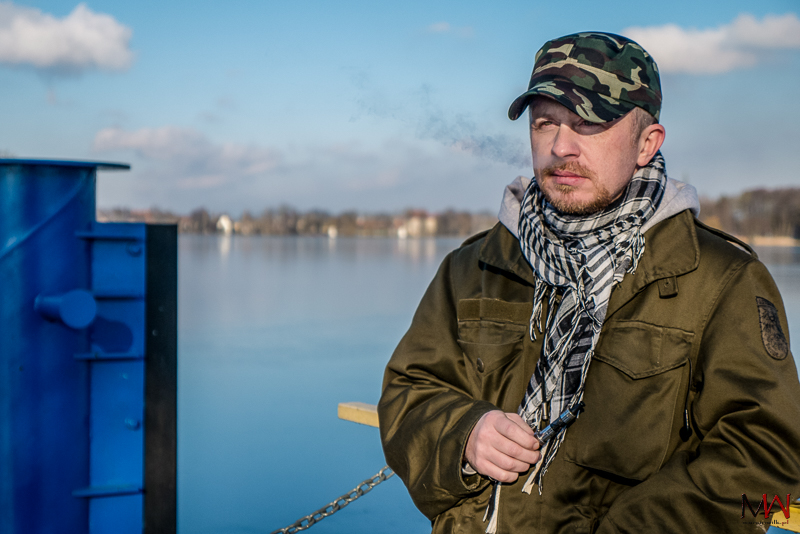 Piotr Prokopiak (Foto: Marcin Wilk)